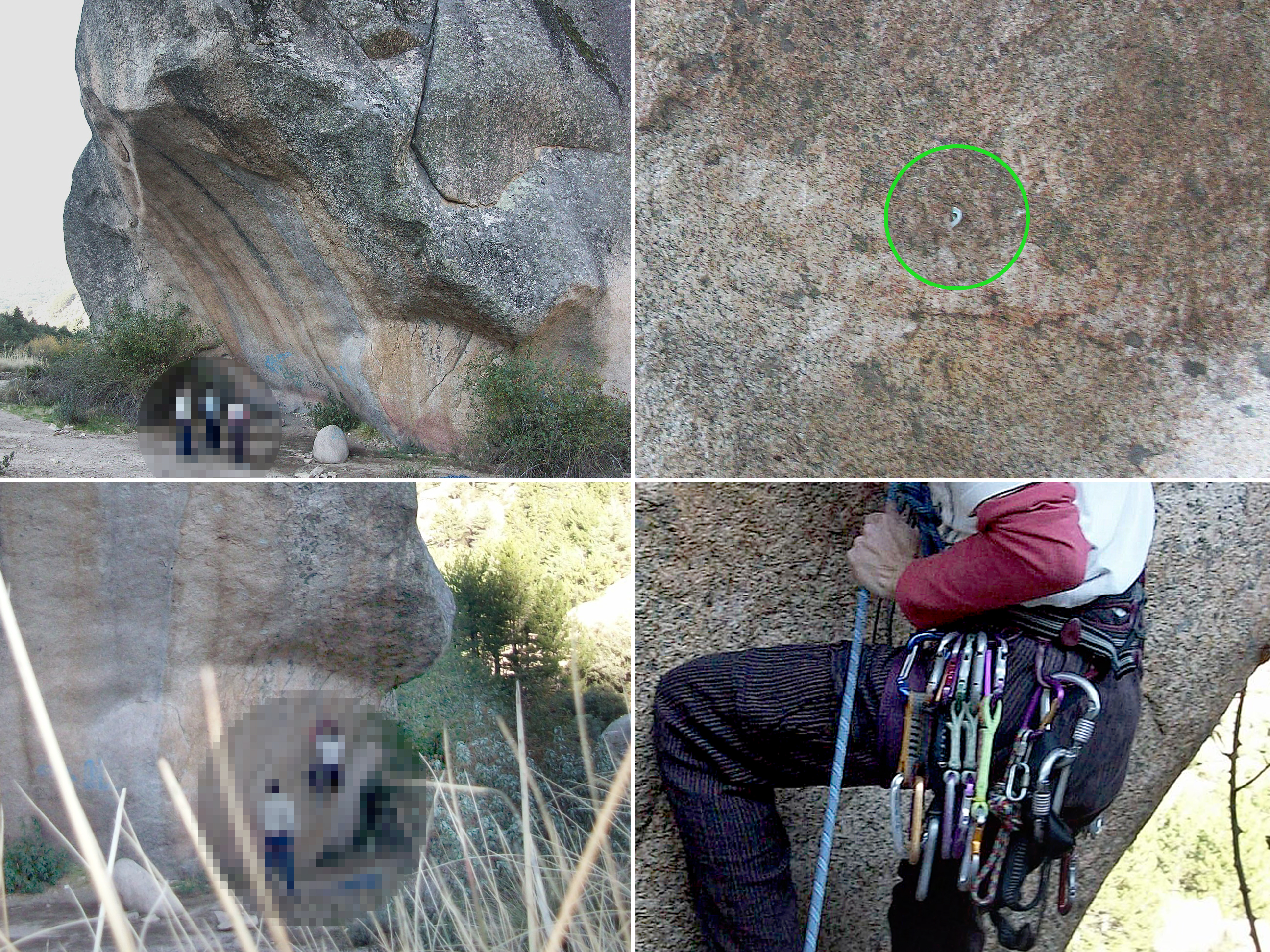 Escaladores. 'La Pedriza' (Comunidad Autonoma Madrid)